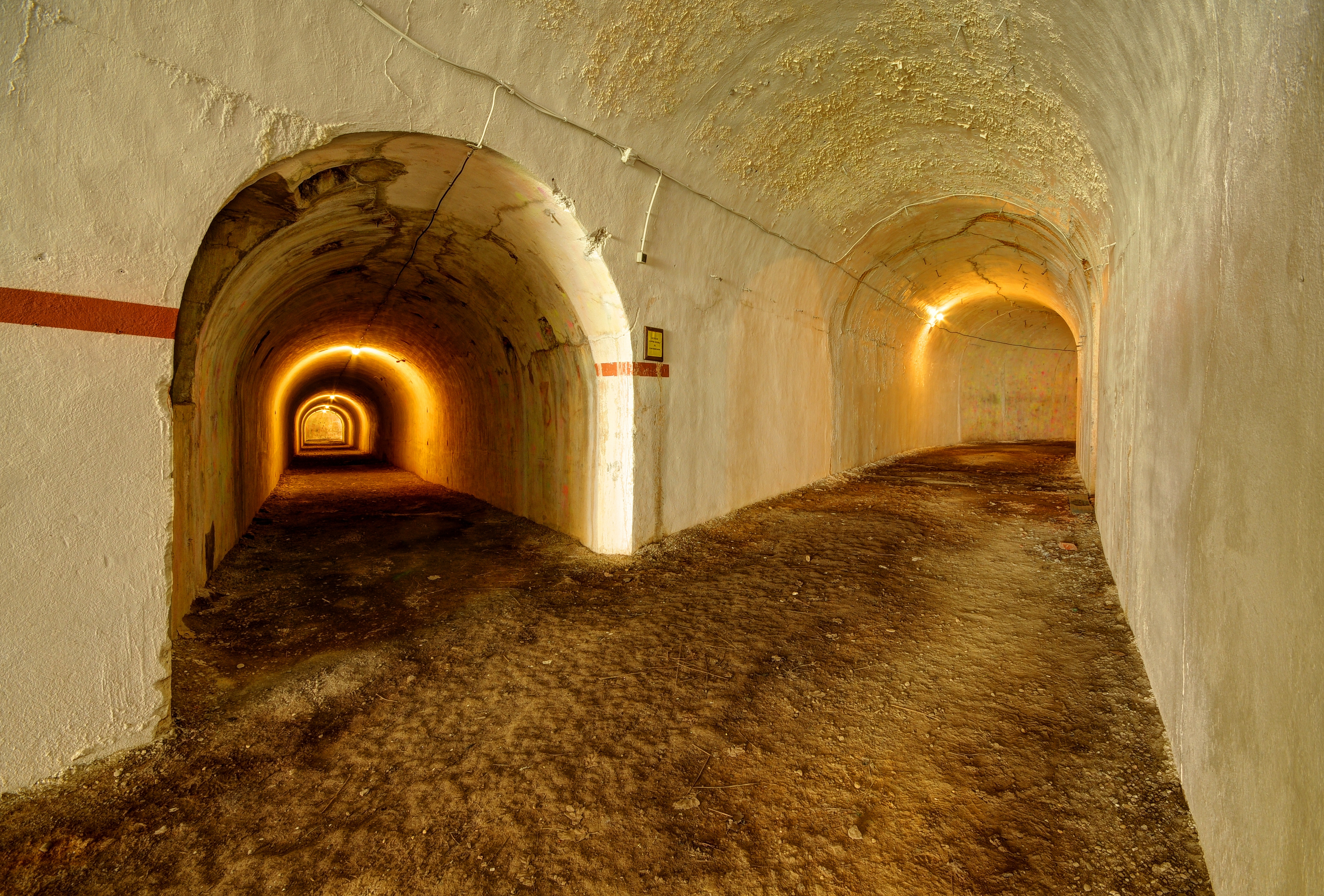 This photograph was taken with a Nikon D300 Batterie de l'Éperon (Frouard, Meurthe-et-Moselle) : sur la gauche, se trouve la galerie d'accès au coffre double de contrescarpe ; sur la droite, se trouve l'accès à la tourelle de 155L (photo HDR).